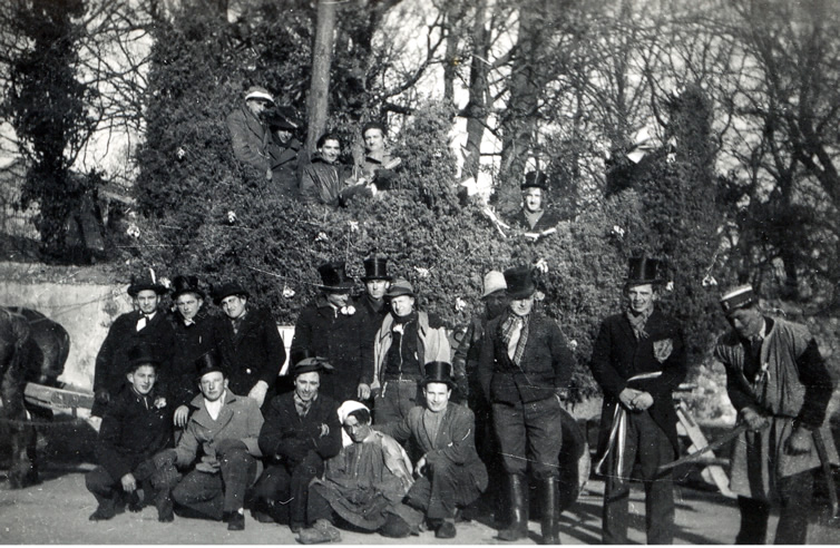 photographie